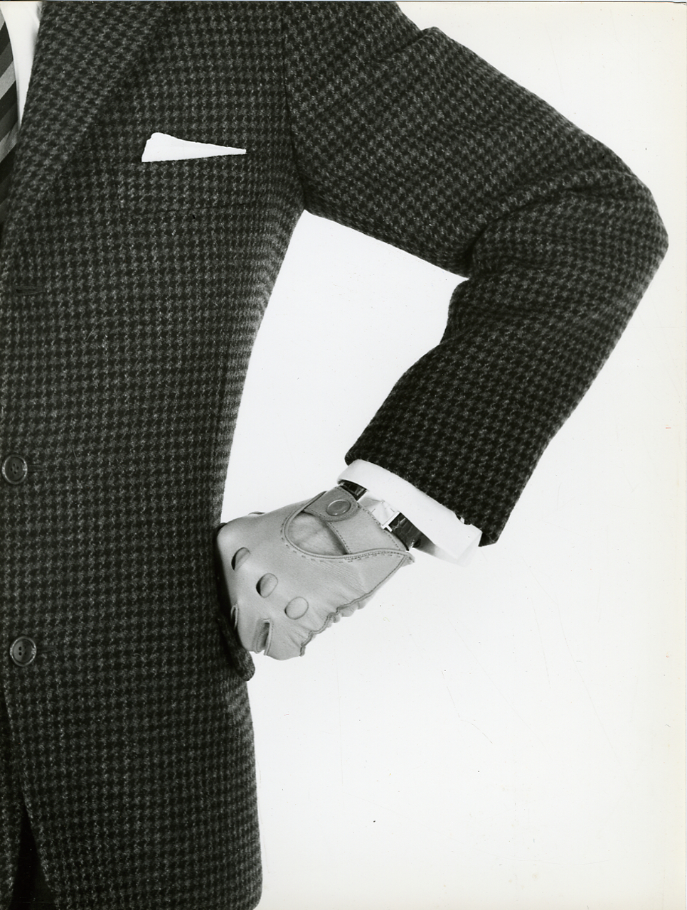 Servizio fotografico : Milano, 1963 / Paolo Monti. - Stampe: 16 : Positivo b/n, gelatina bromuro d'argento/ carta, 30x40. - ((Al verso manoscritti i numeri dei negativi corrispondenti: 6020, 6023, 6025, 6026, 6027, 6029, 6030, 6103, 6104, 6105. - Confronta scheda G06020-6105. - Sul coperchio della scatola iscrizione didascalica manoscritta a pennarello nero: "Composizioni - studi - soffitte". - Fonte: Agenda di Paolo Monti: R 1 - Monti/ 1 aprile 1963 - 6 giugno 1964/ 6000-8193 (1963-1964), presso Archivio Paolo Monti